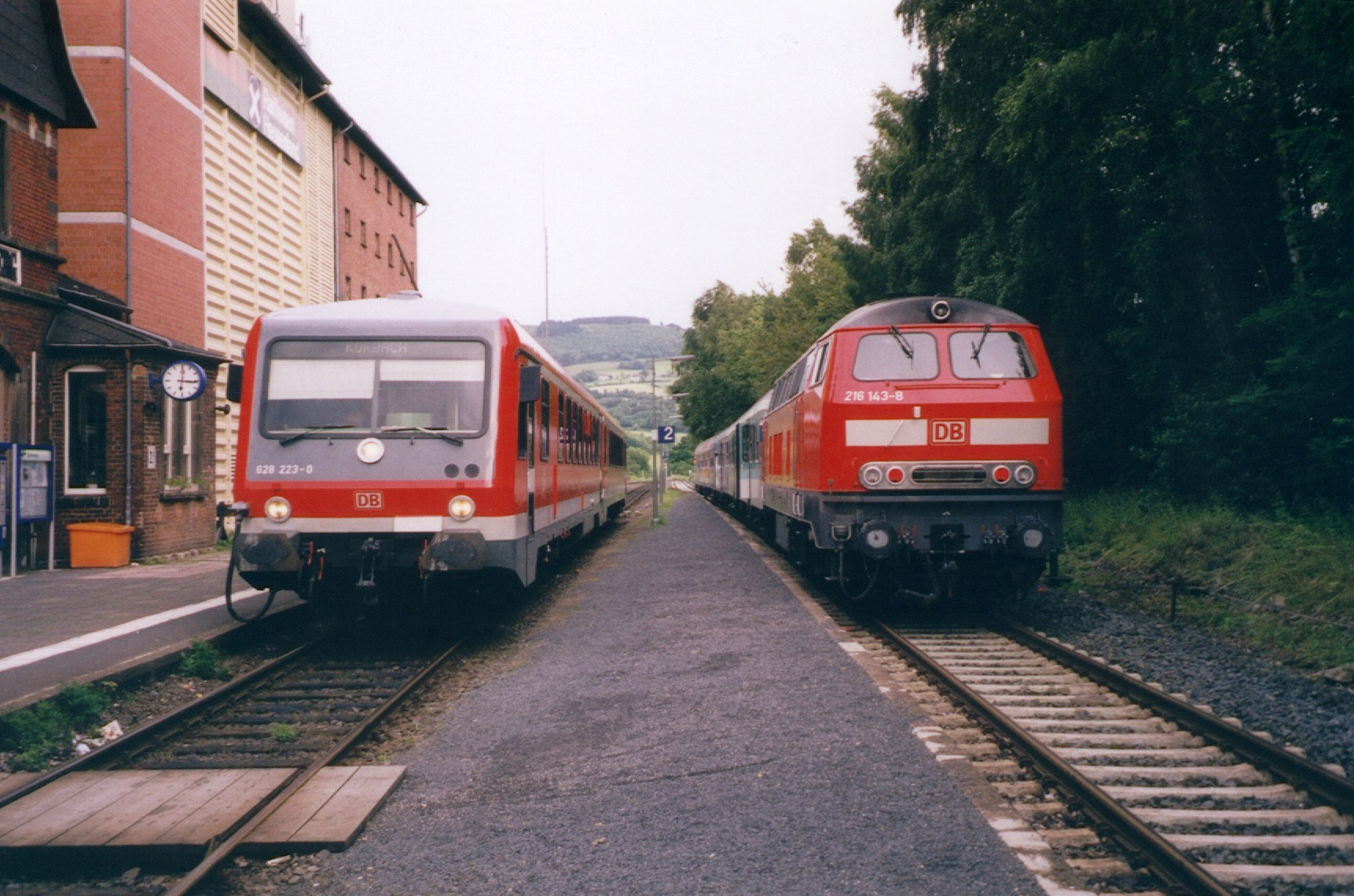 Zugkreuzung in Zierenberg an der Strecke Volkmarsen - Obervellmar mit 628 223 und 216 143-8 am 12.06.2002